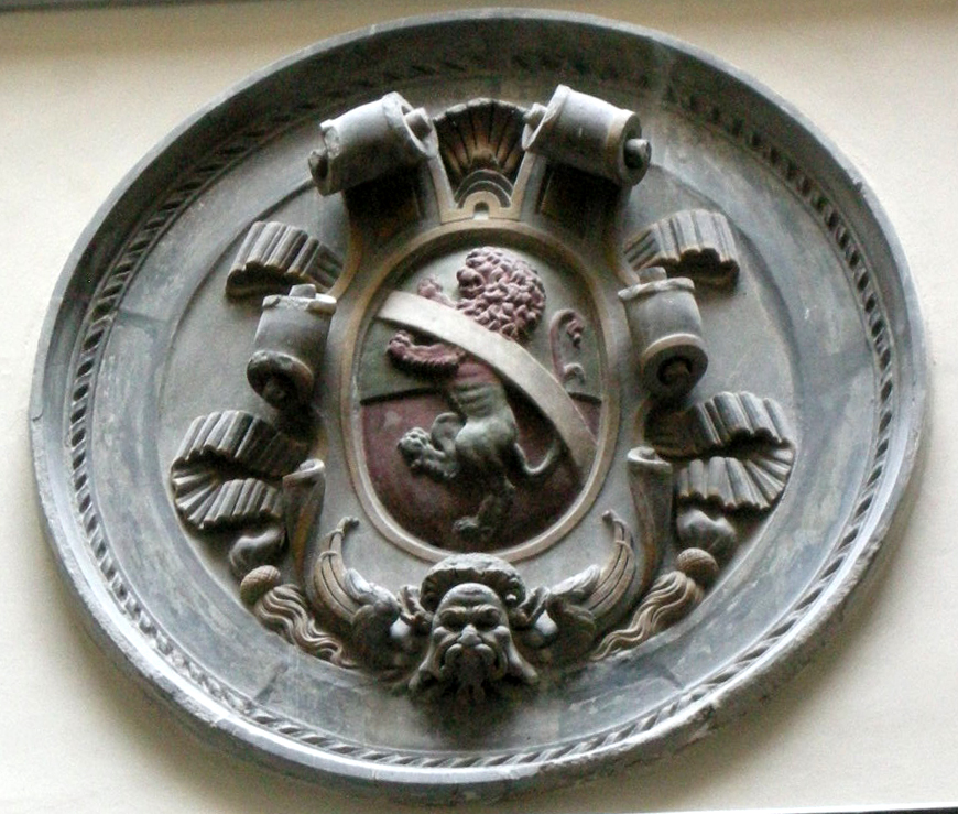 Palazzo corsi tornabuoni, cortile, stemma corsi2